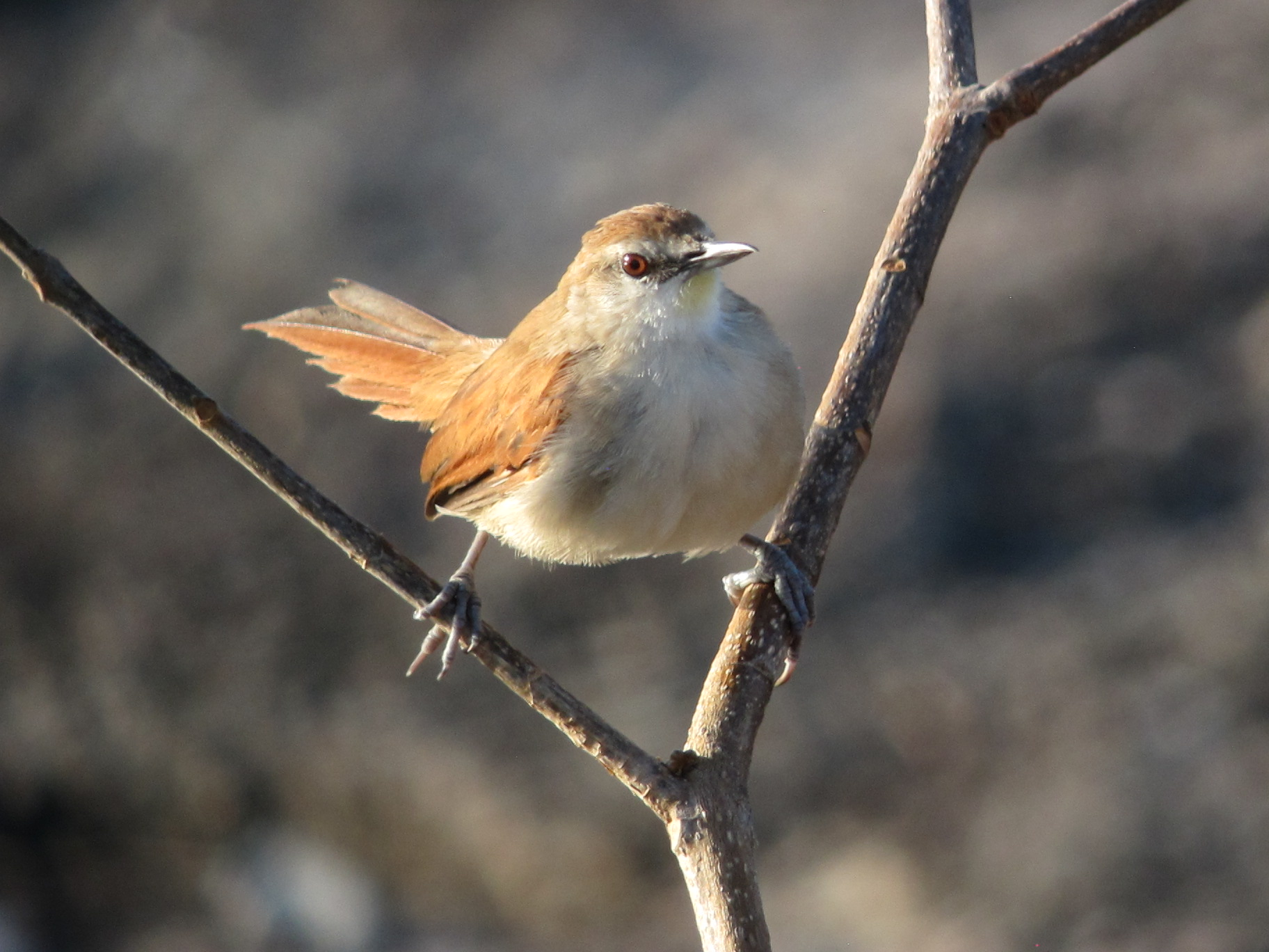 Puerto Carreño, Vichada, Colombia